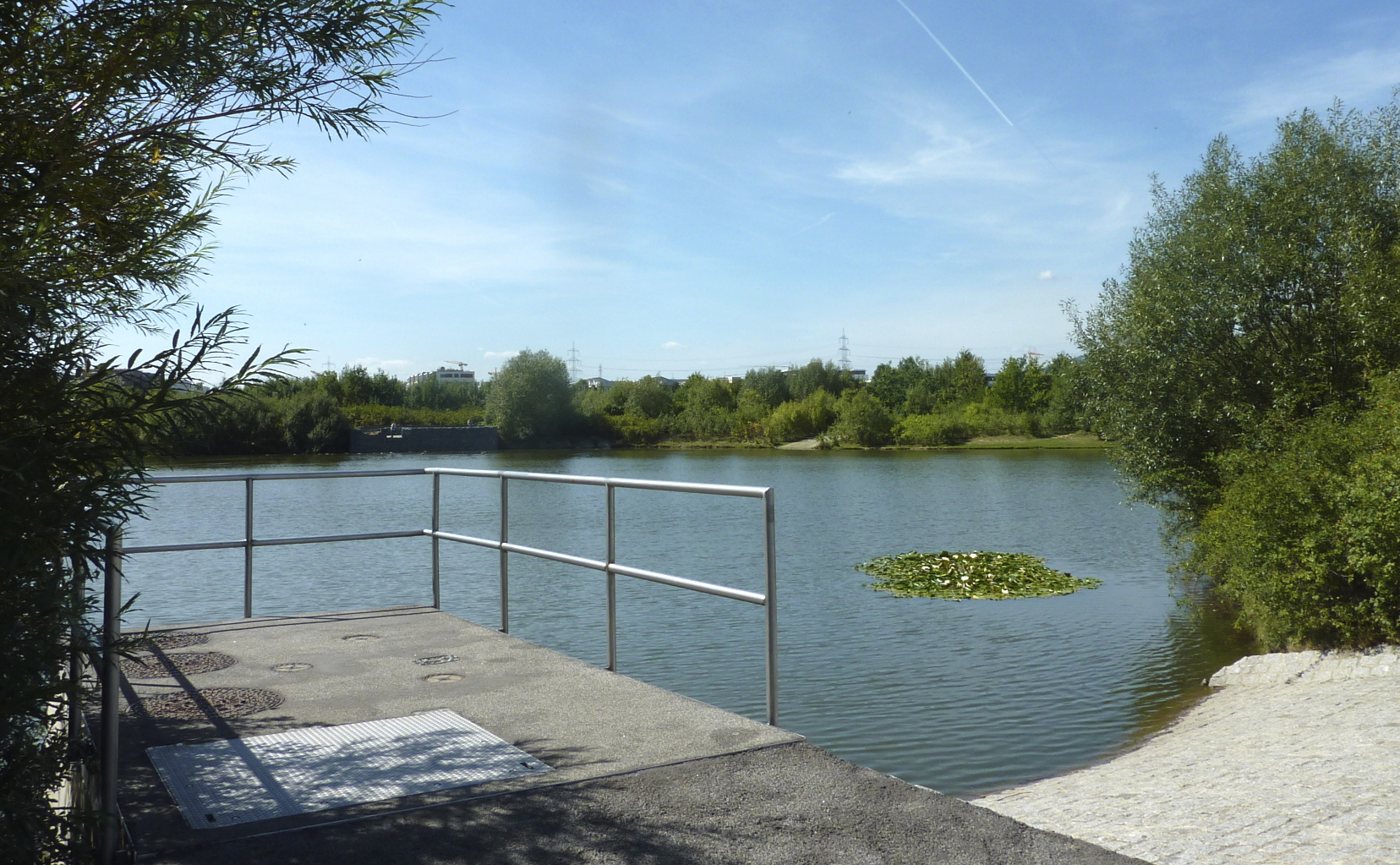 Der Kätcheslachpark ist eine Grünanlage im Stadtteil Kalbach-Riedberg der Stadt Frankfurt am Main. Der Park mit zentralem Teich, Regenwasser-Rückhaltebecken sowie mehreren Zu- und Ablaufgräben wurde von 2006 bis 2007 in einer Mulde der Anhöhe Riedberg angelegt. Sein Hauptzweck ist die Gewässerregulierung der benachbarten, zur selben Zeit neu angelegten Wohnsiedlung. Das Foto zeigt eine Ansicht des Teichs von dessen östlichem Ufer aus. Die Aussichtsplattform im Vordergrund befindet sich über einem dem Abfluss des Gewässers vorgeschalteten Drosselbauwerk.